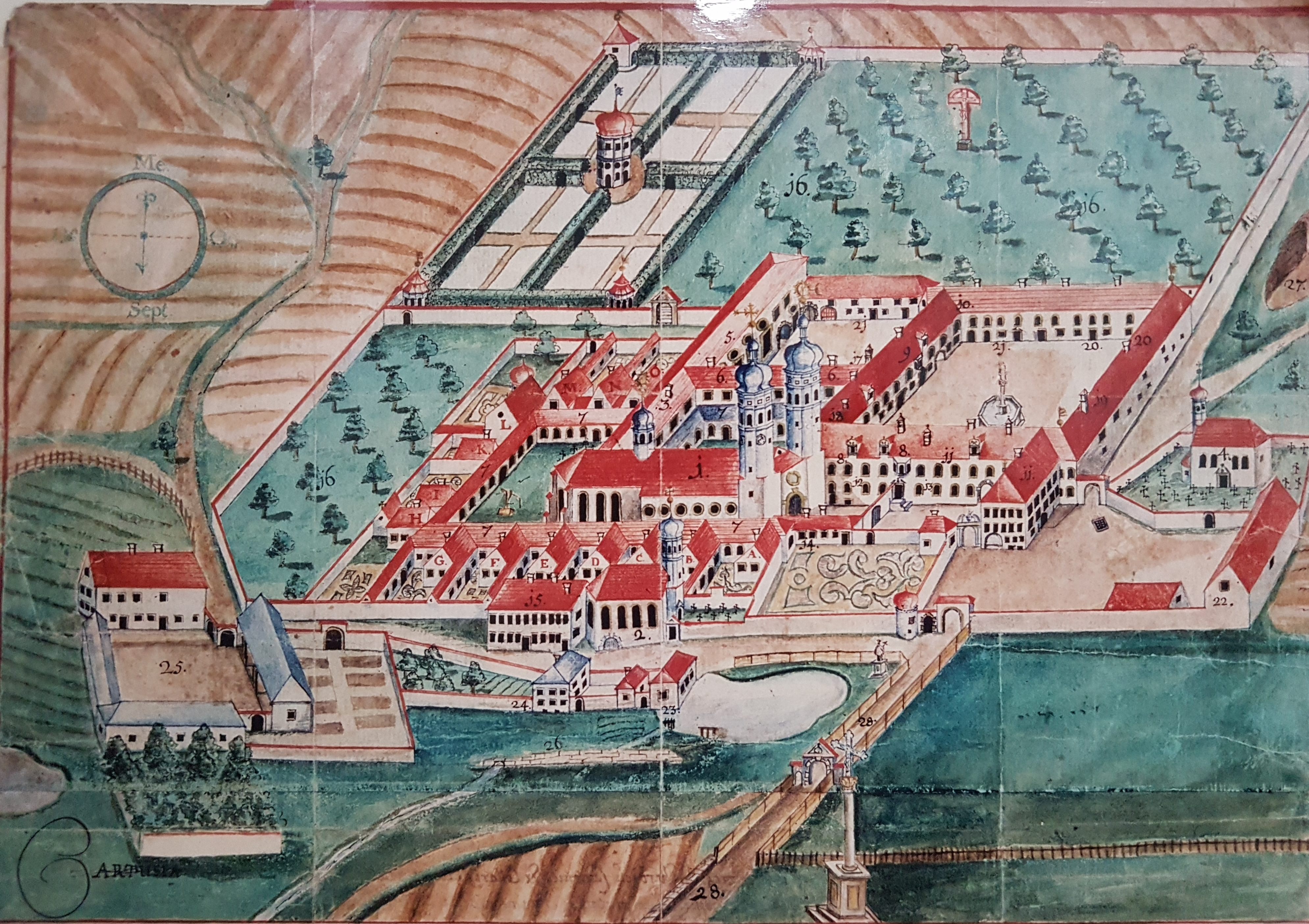 Das Karthäuserkloster Prüll auf einem Gemälde von 1742